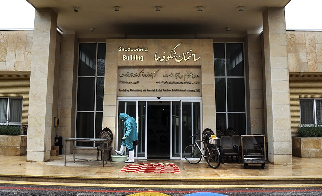 روزهای کرونایی در کهریزک